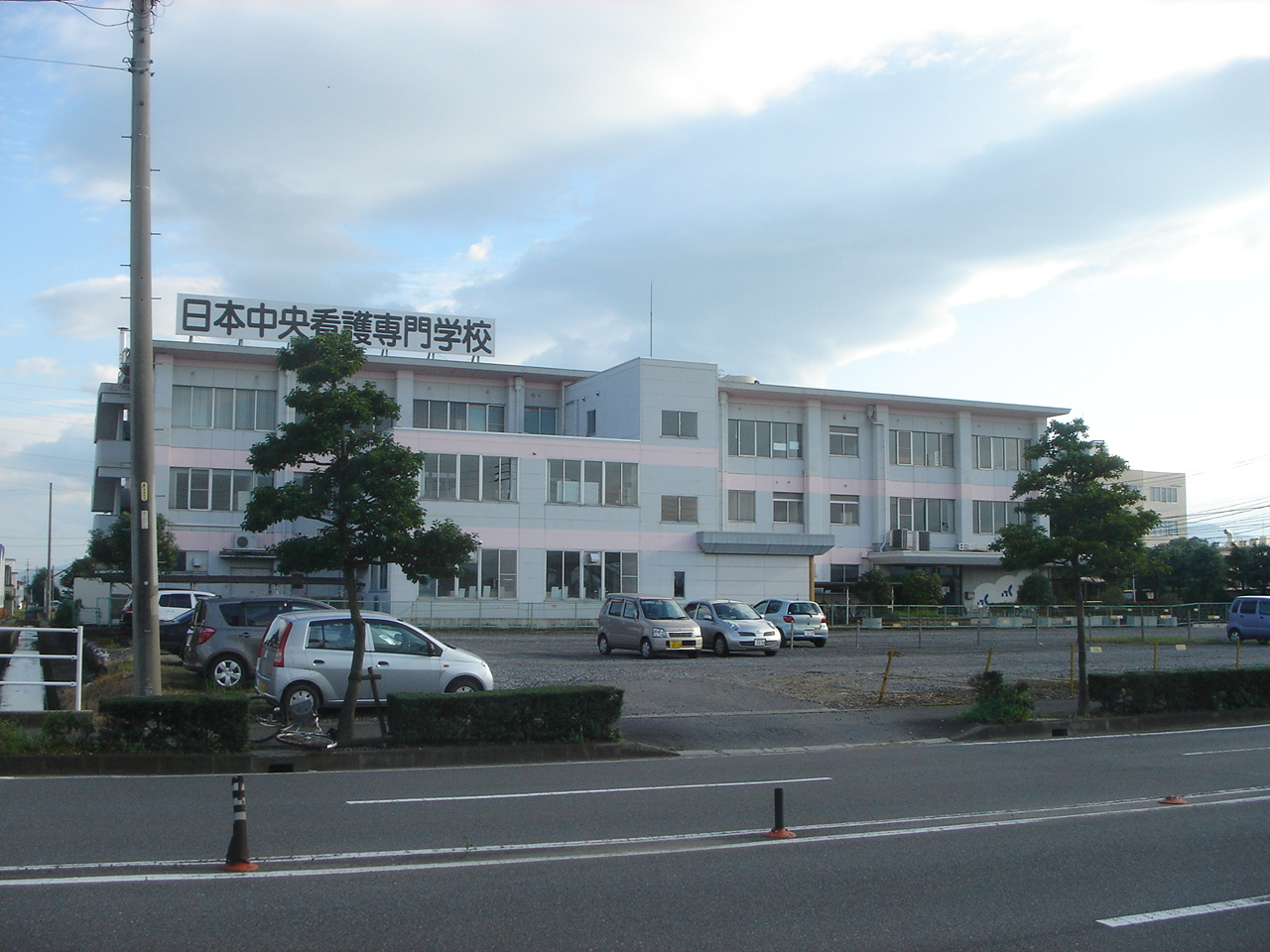 Nihon Chuo Nursing College Ogaki(日本中央看護専門学校),Ogaki,Gifu,Japan(岐阜県大垣市)で北側より撮影。前の道路はw:ja:岐阜県道216号赤坂垂井線